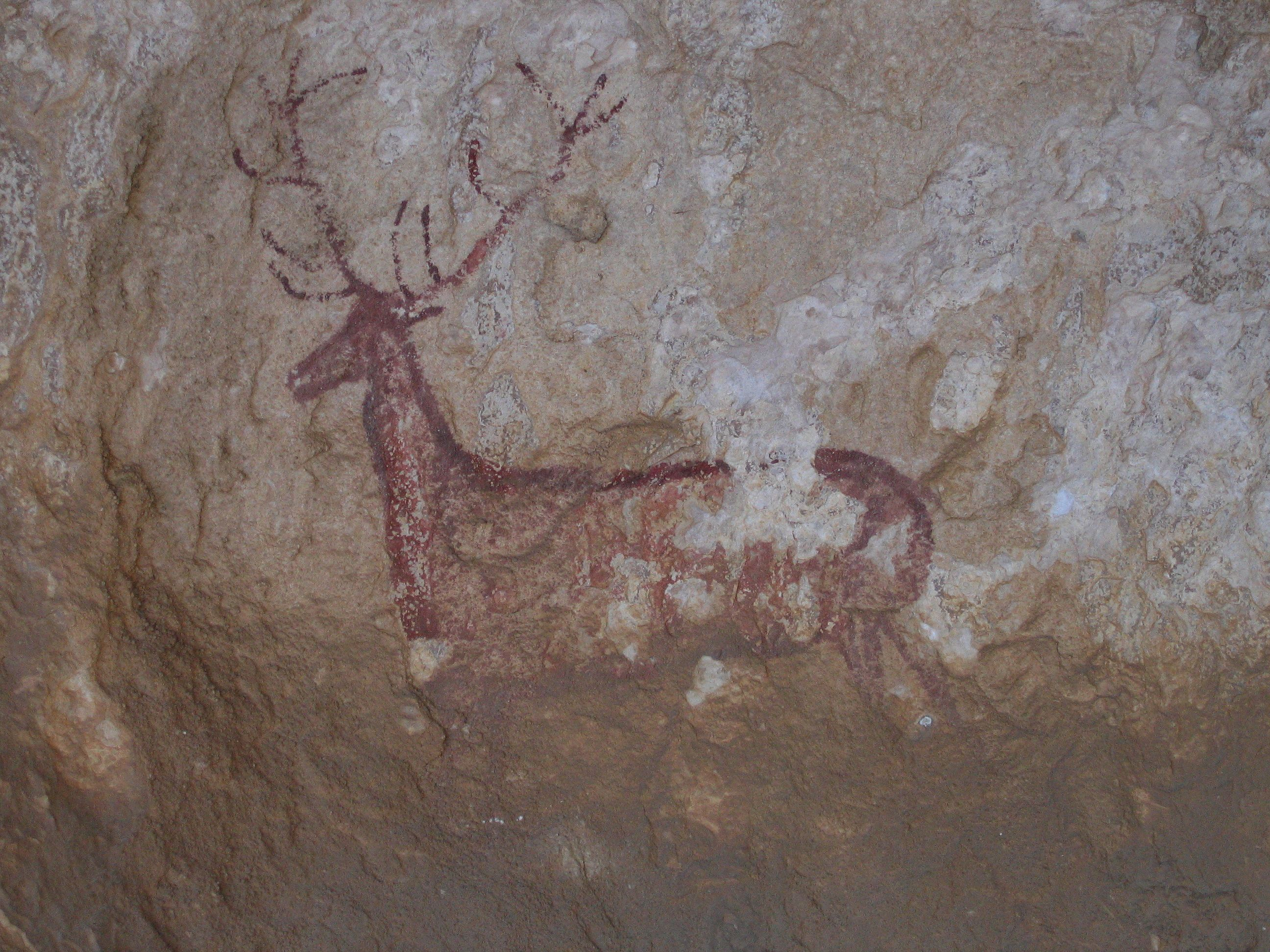 Description: Peinture préhistorique, Abri de ChimiachasAragon, Espagne Source: Hugo Soria Licence: GFDL